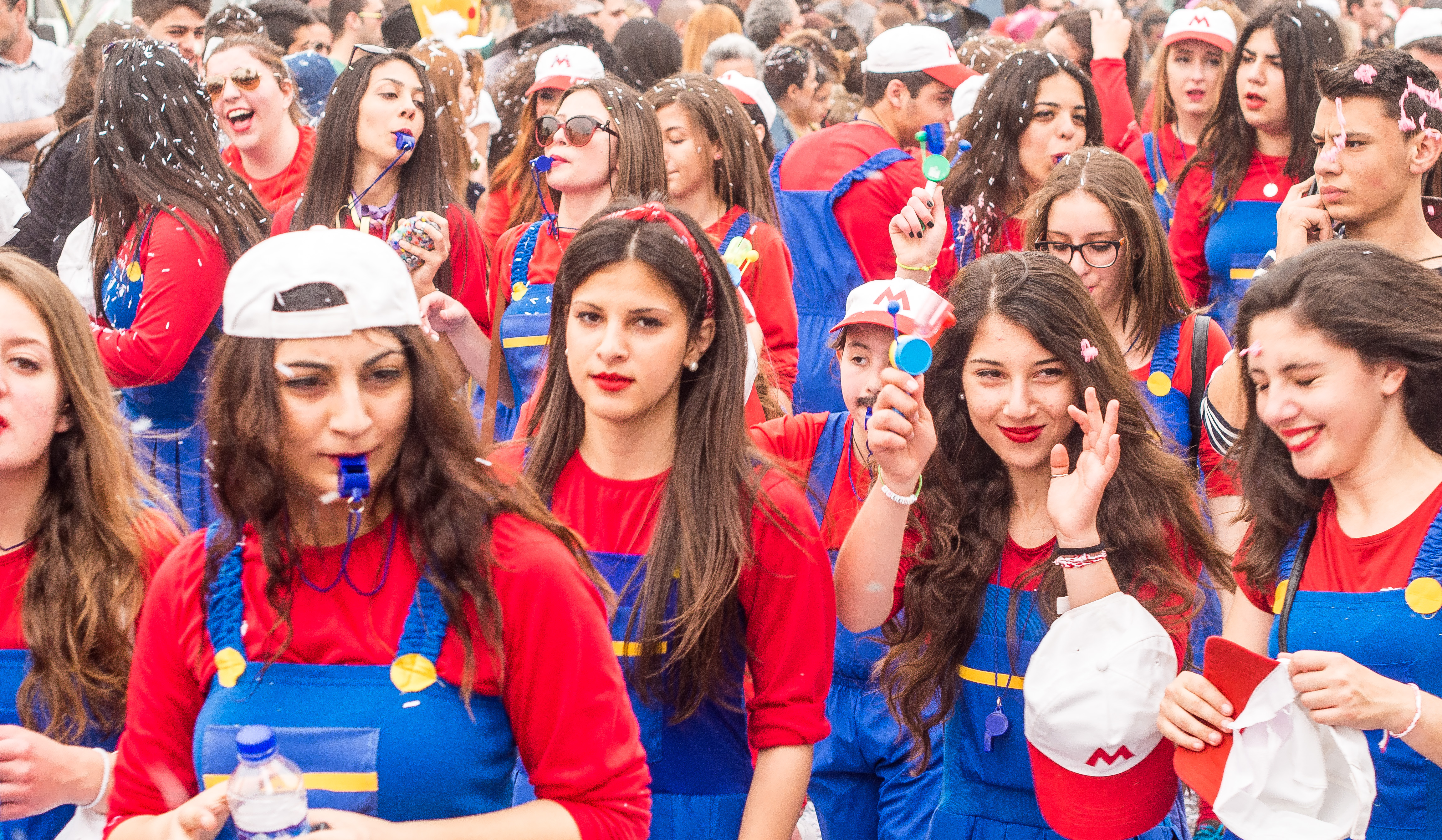 Carnival in Limassol 2014